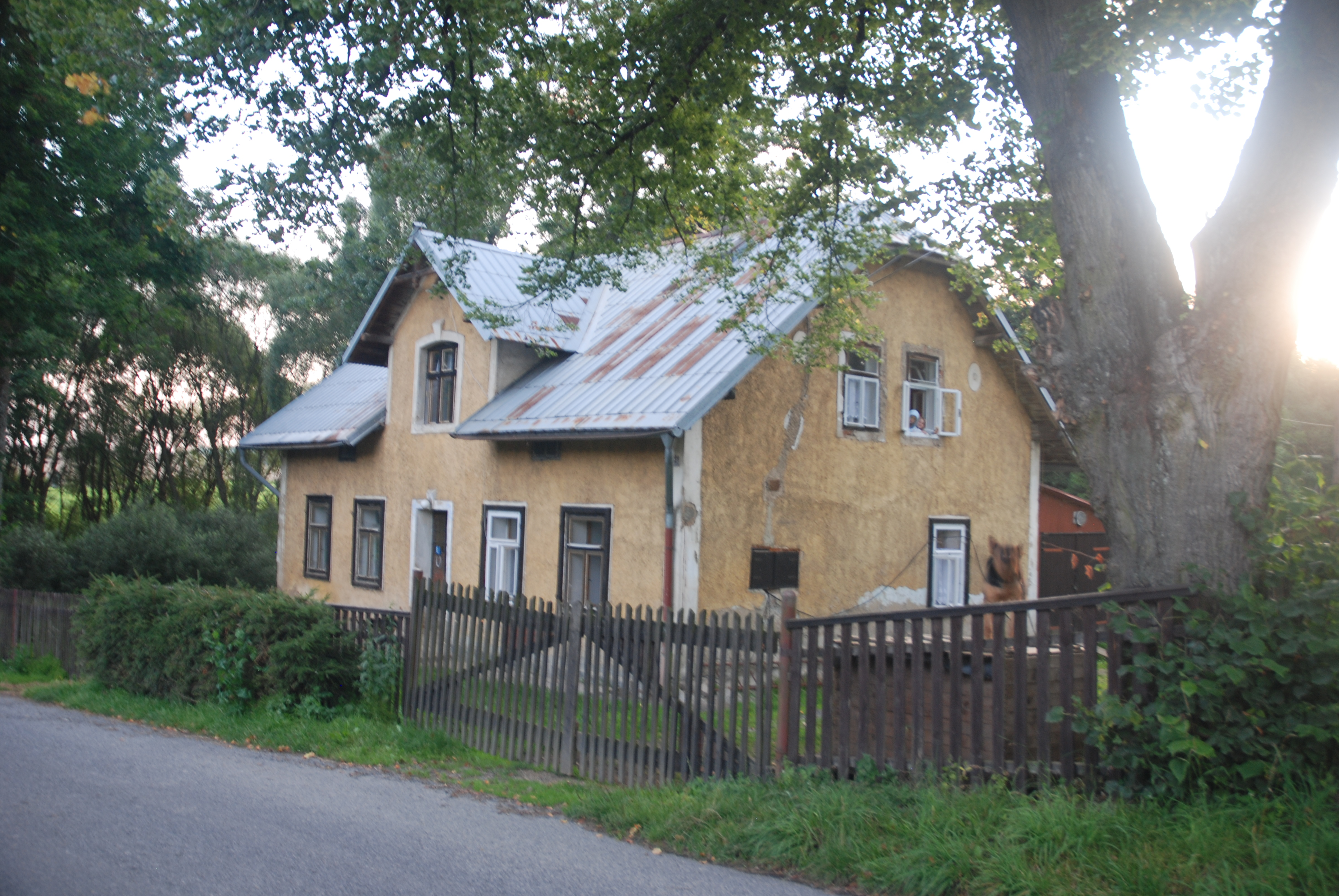 Březí, okres Tachov